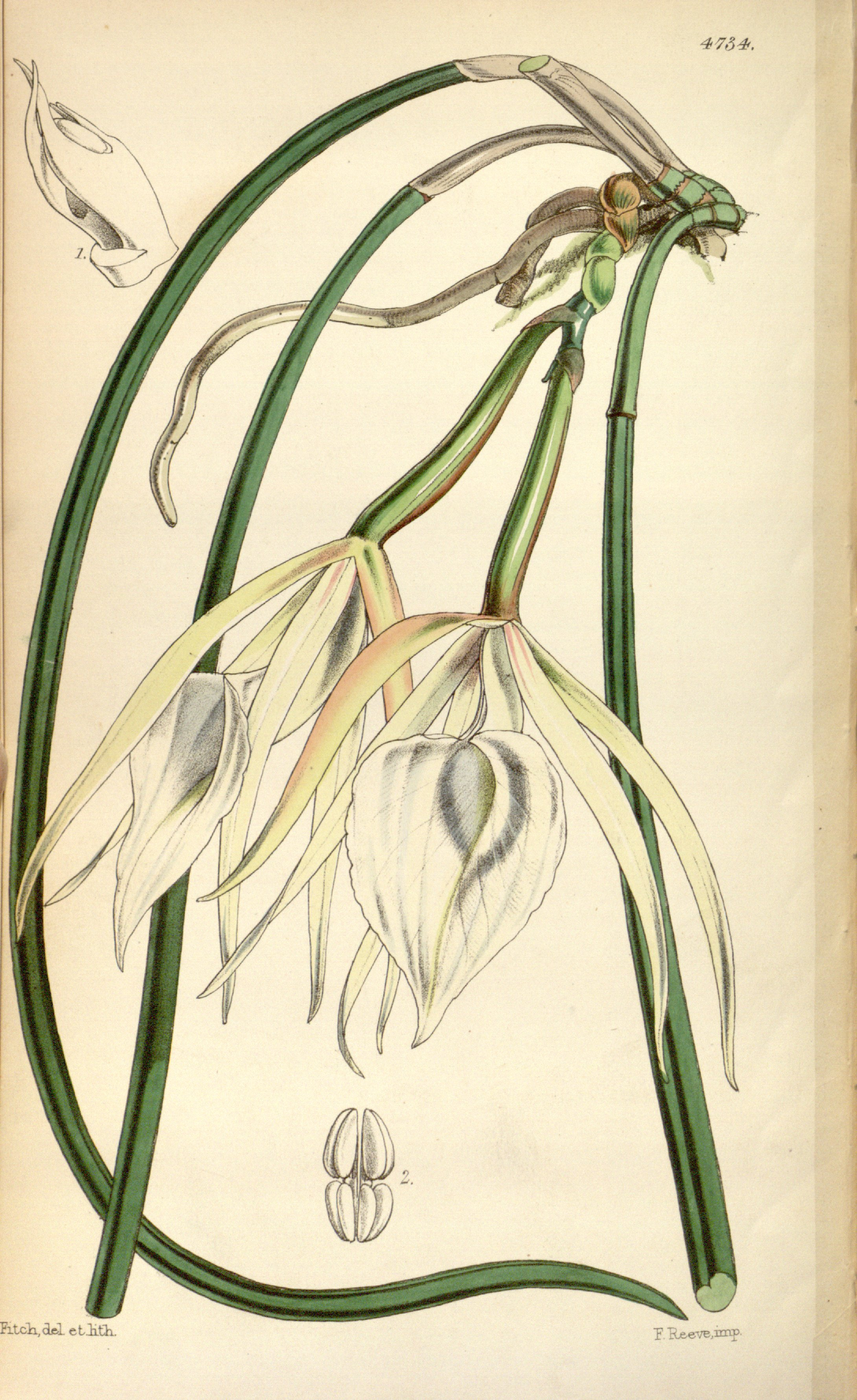 Illustration of Brassavola acaulis (as syn. Brassavola lineata)